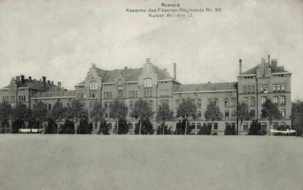 Kaserne des Füsilier-Regiments „Kaiser_Wilhelm“ Nr. 90 in Rostock in der Ulmenstraße.